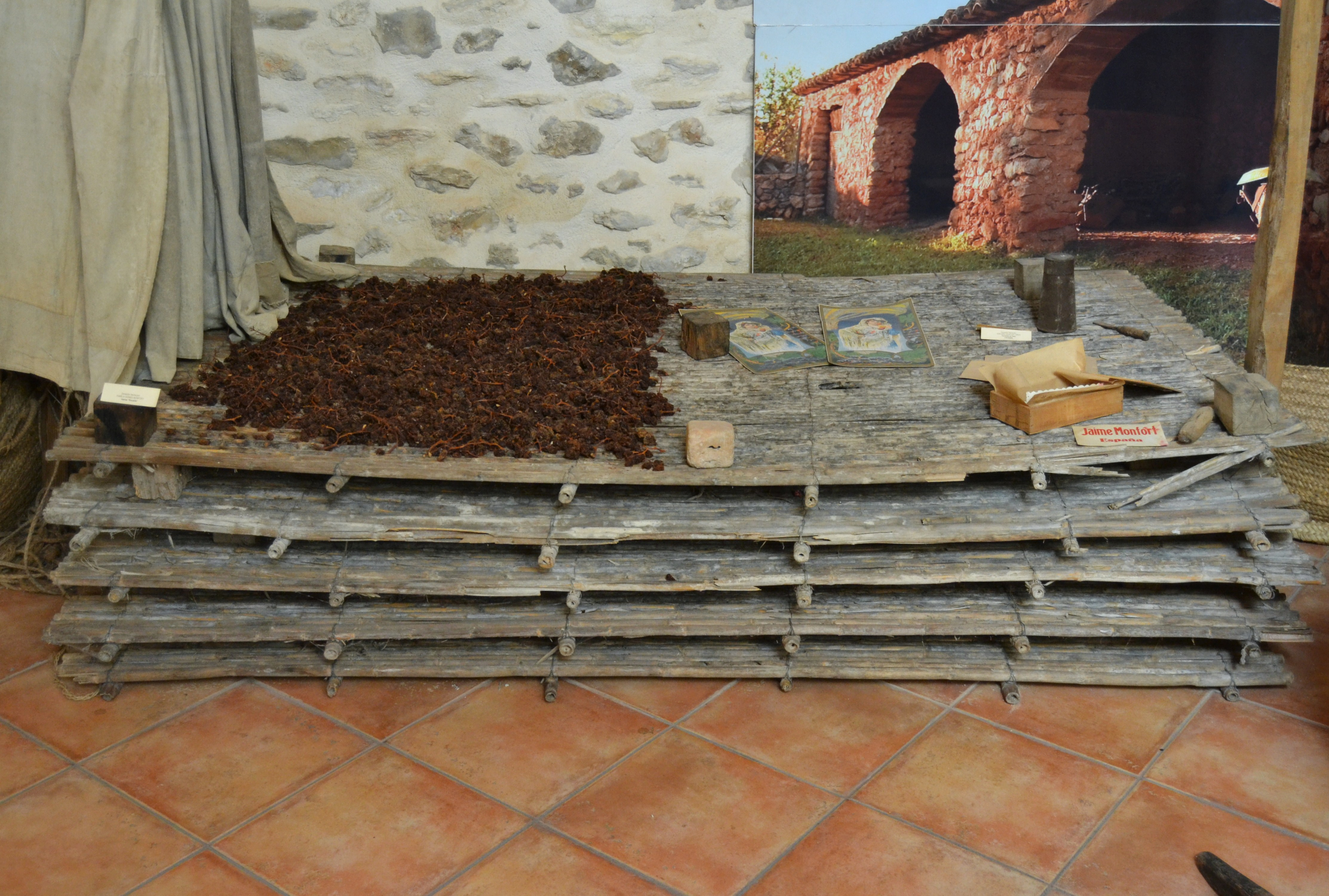 Canyissos i pansa, museu etnològic de Gata de Gorgos.